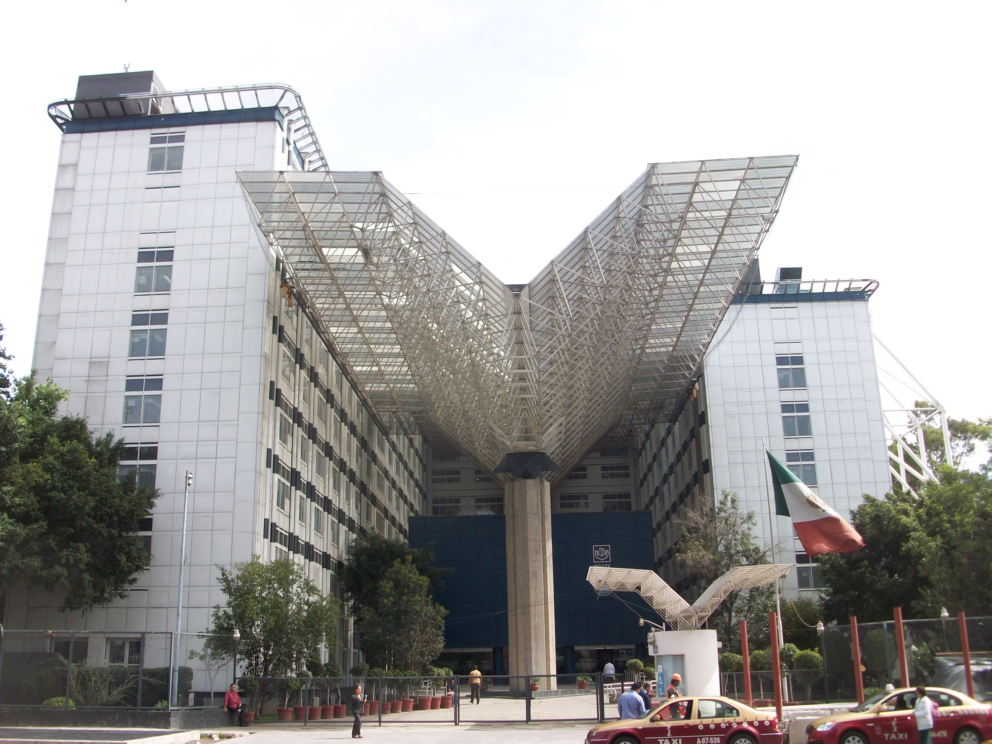 Fachada del Centro Medico Nacional 20 de Noviembre